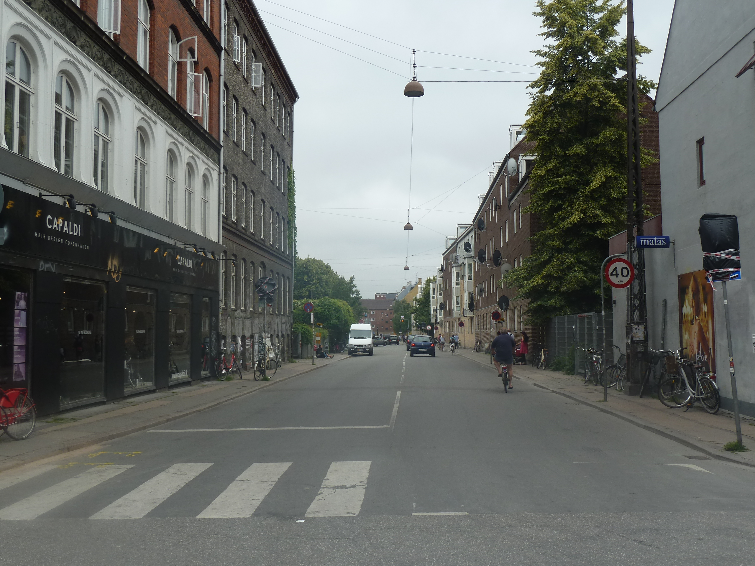 The street Stengade in Copenhagen seen from Nørrebrogade.